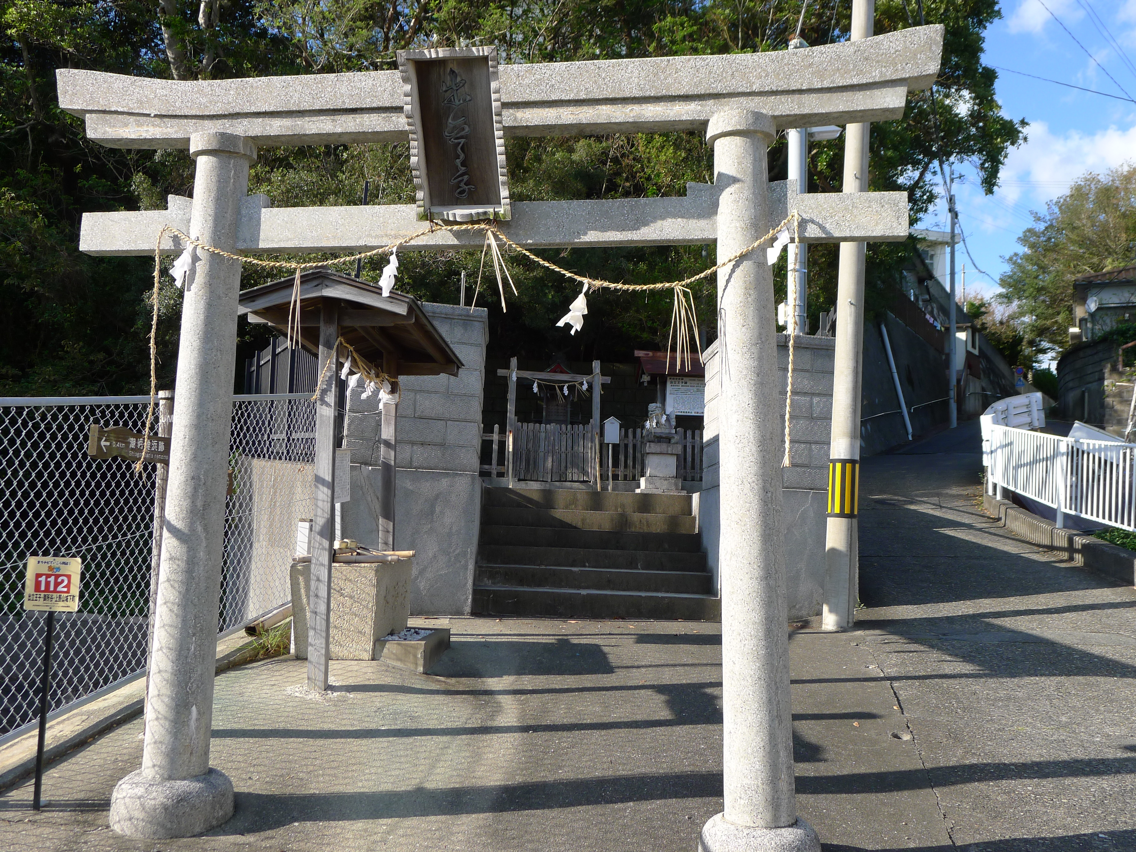 熊野古道・紀伊路の九十九王子の一つ出立王子（和歌山県田辺市）